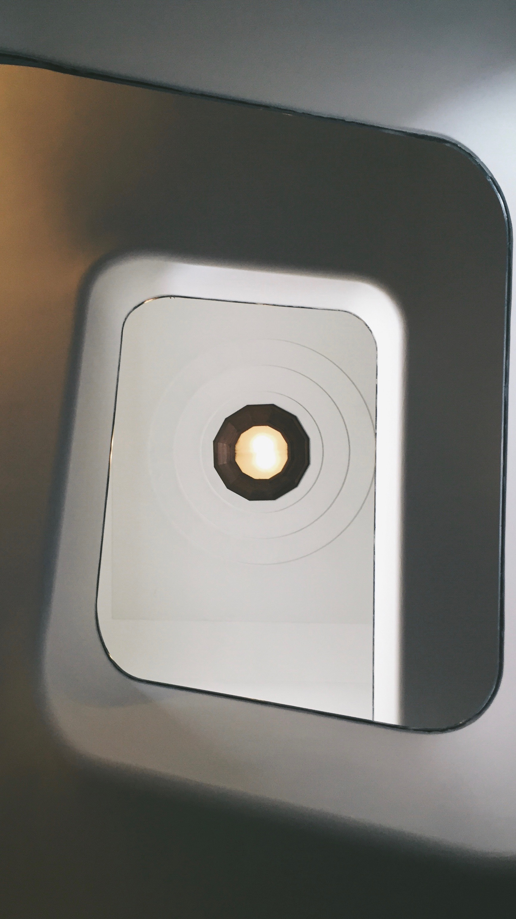 درج سلالم بناية بنك المغرب الدار البيضاء